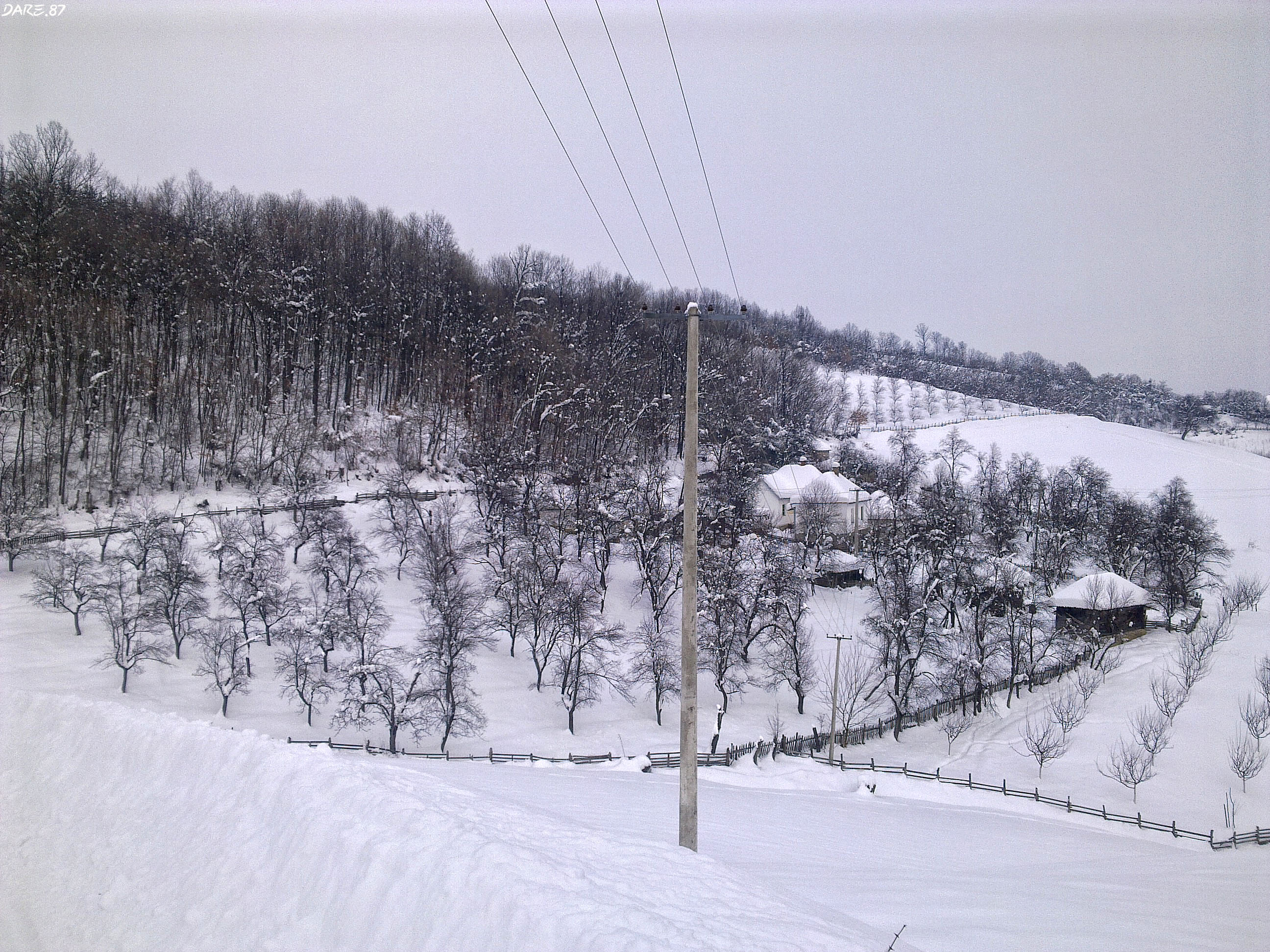 Opis: Tolisavac zimi Autor: Darko Pavlović = Dare.987 Izvor: Sopstveno delo